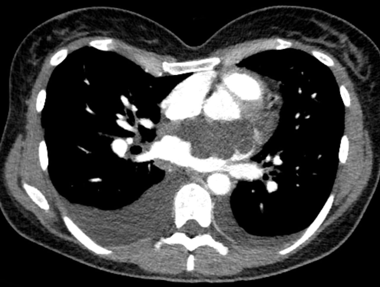 Großes Vorhofmyxom mit Ausdehnung vor allem in den linken Vorhof und hämodynamischer Wirkung, so dass es zu einer beginnenden Dekompensation kam. Siehe auch Pleuraergüsse rechts mehr als links. Die Dichtewerte in der Computertomographie schwankten um ca. 25 bis 30 HE.